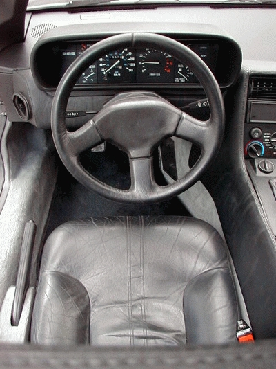 De Lorean